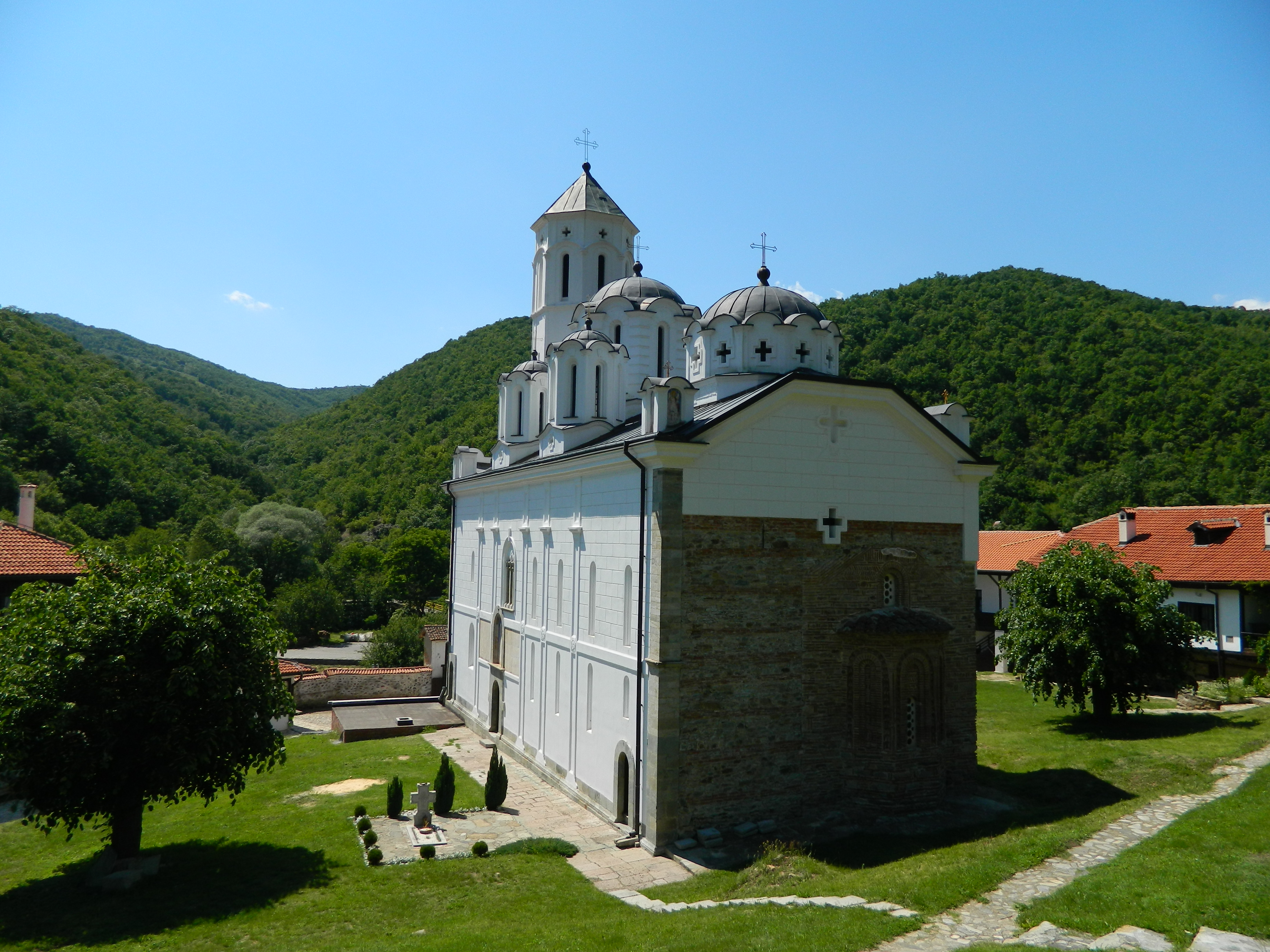 Монастырь Прохора Пчиньского, Сербия, храм